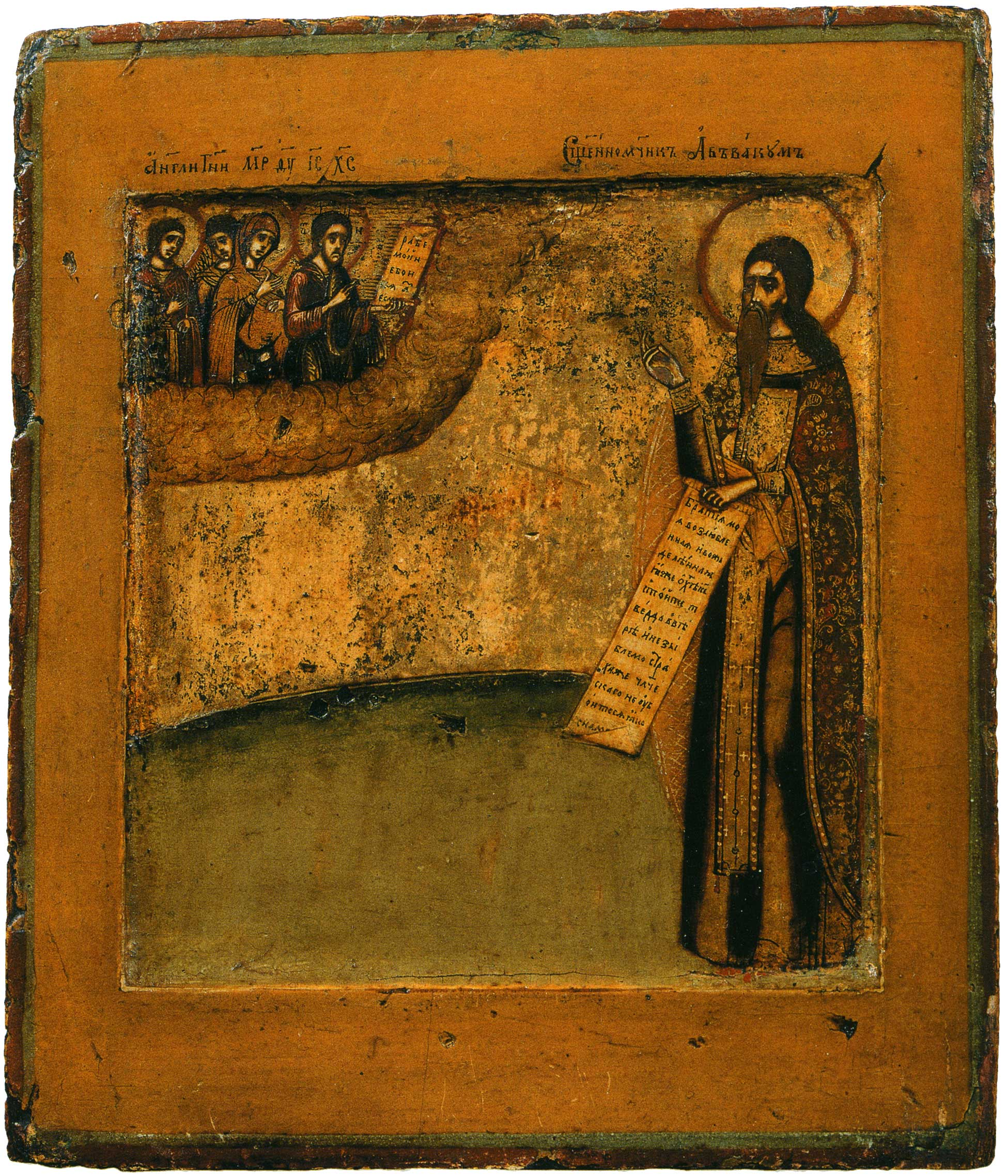 Протопоп Аввакум Школа или худ. центр: Поволжье Конец XVII — начало XVIII вв. Дерево, левкас, темпера. 14.5 × 12 см Государственный исторический музей, Москва, Россия